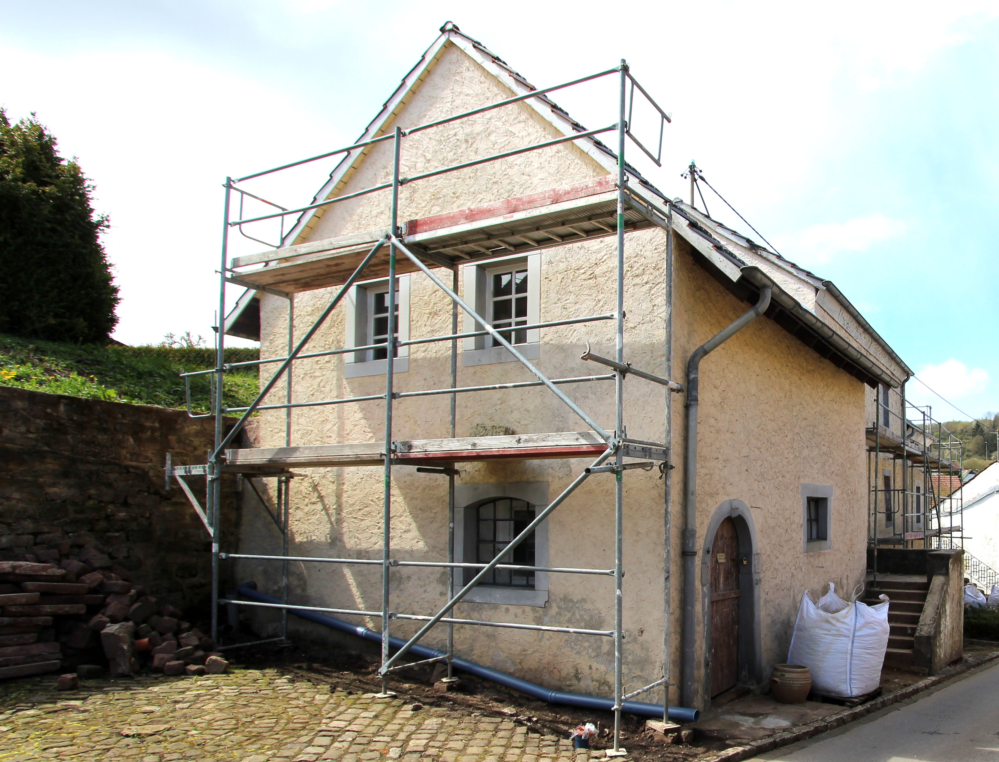 54636 Baustert, Brunnenstraße 6. Streckhof im nahezu unveränderten Zustand. Wohnraum mit Stall, Speicher und Unterstall. Das Tor zum Unterstall wurde als Rundbogen aus Sandstein gefertigt. Blickrichtung aus Osten. Aufnahme von 2016.